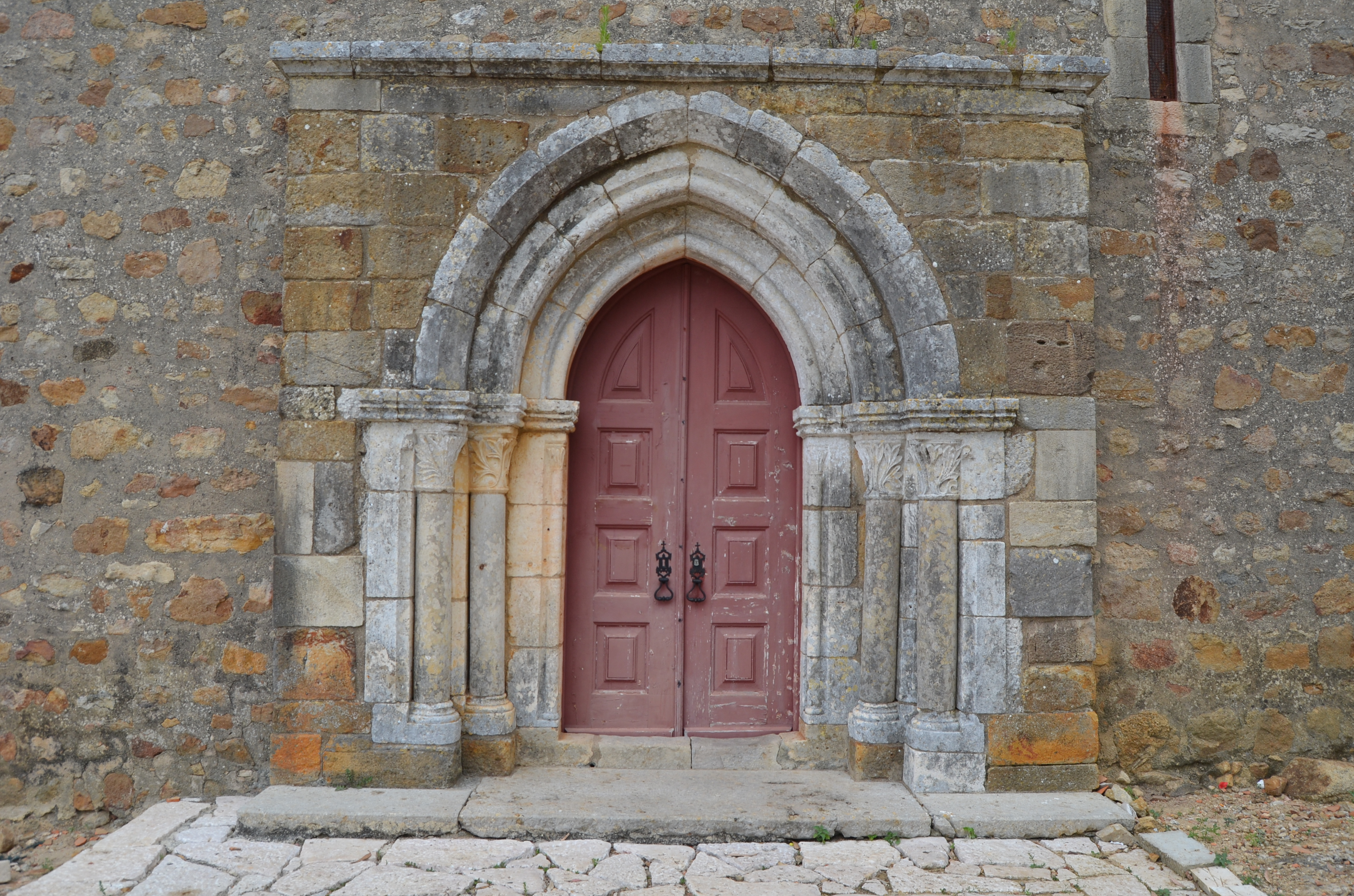 Silent doors